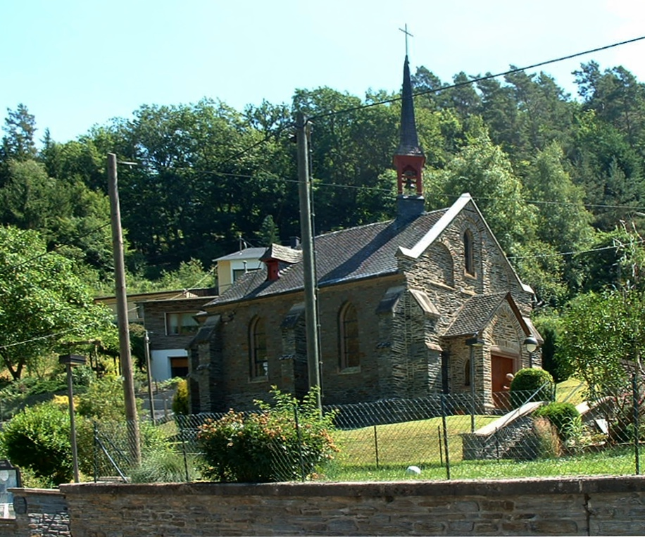 Evangelische Kapelle in Kautenbach, einem Ortsteil von Traben-Trarbach